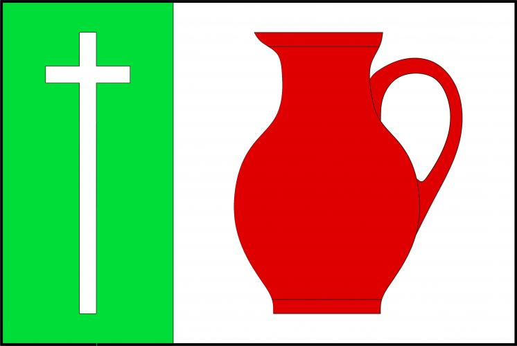 Mezouň vlajka